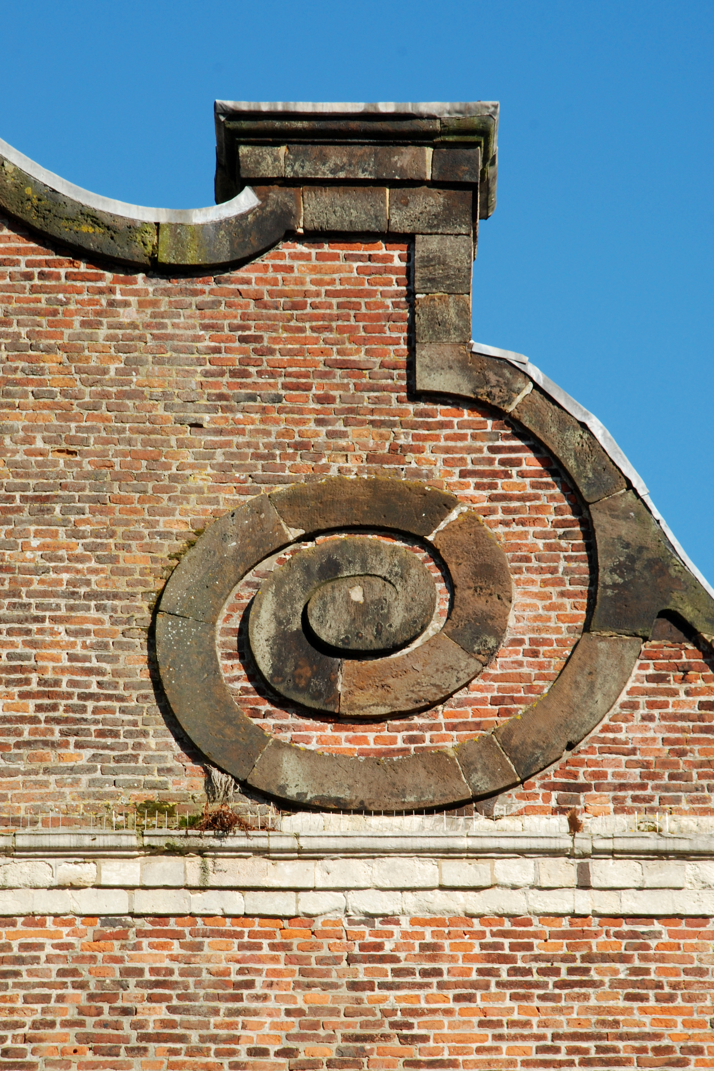 Belgique - Wallonie - Wavre - Église Saint-Martin de Limal